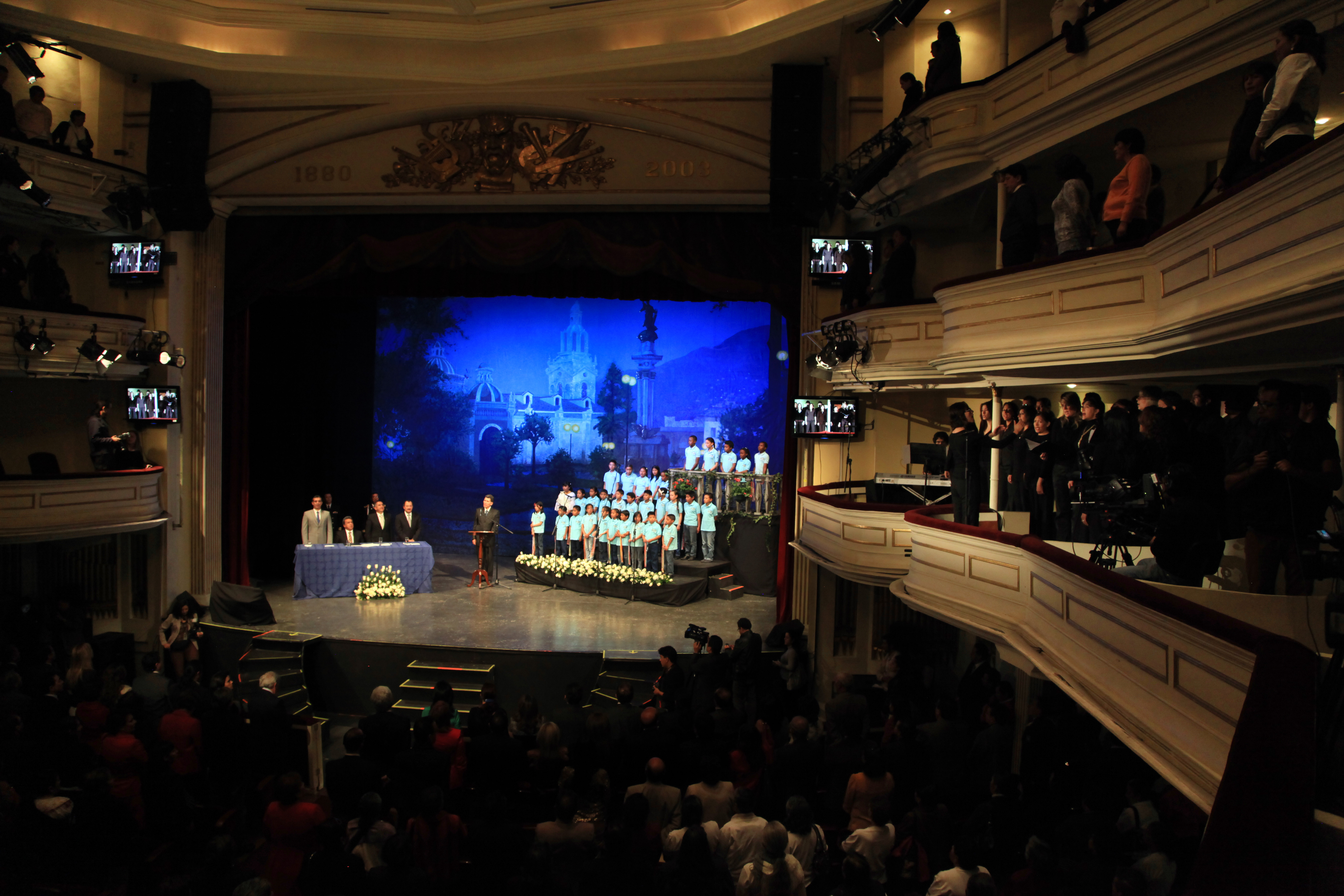 Quito (Ecuador), 22 de mayo 2013. En el Teatro Sucre el Alcalde de Quito, Augusto Barrera, ofreció un Homenaje al Vicepresidente saliente, Lenin Moreno. El Canciller Ricardo Patiño acompañó. Foto: Fernanda LeMarie - Cancillería del Ecuador.